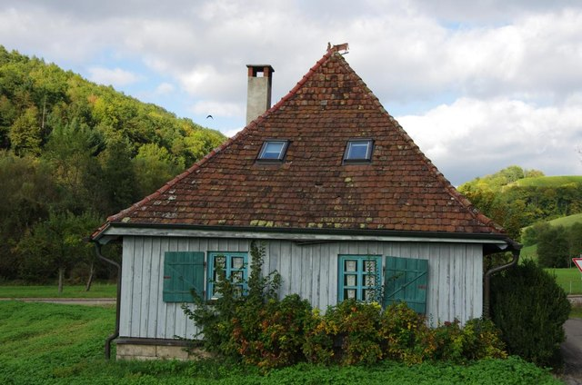 Alte Gemeindekelter - Jettenbach